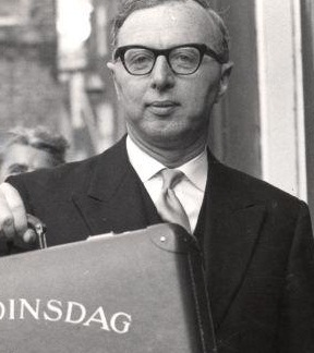 Minister van Financien Prof.Dr.J.Zijlstra met het beroemde koffertje van de Derde Dinsdag in September, komt de miljoenennota aanbieden in de Tweede Kamer. Rechts mevrouw Zijlstra- Bloksma. 17 september 1961.